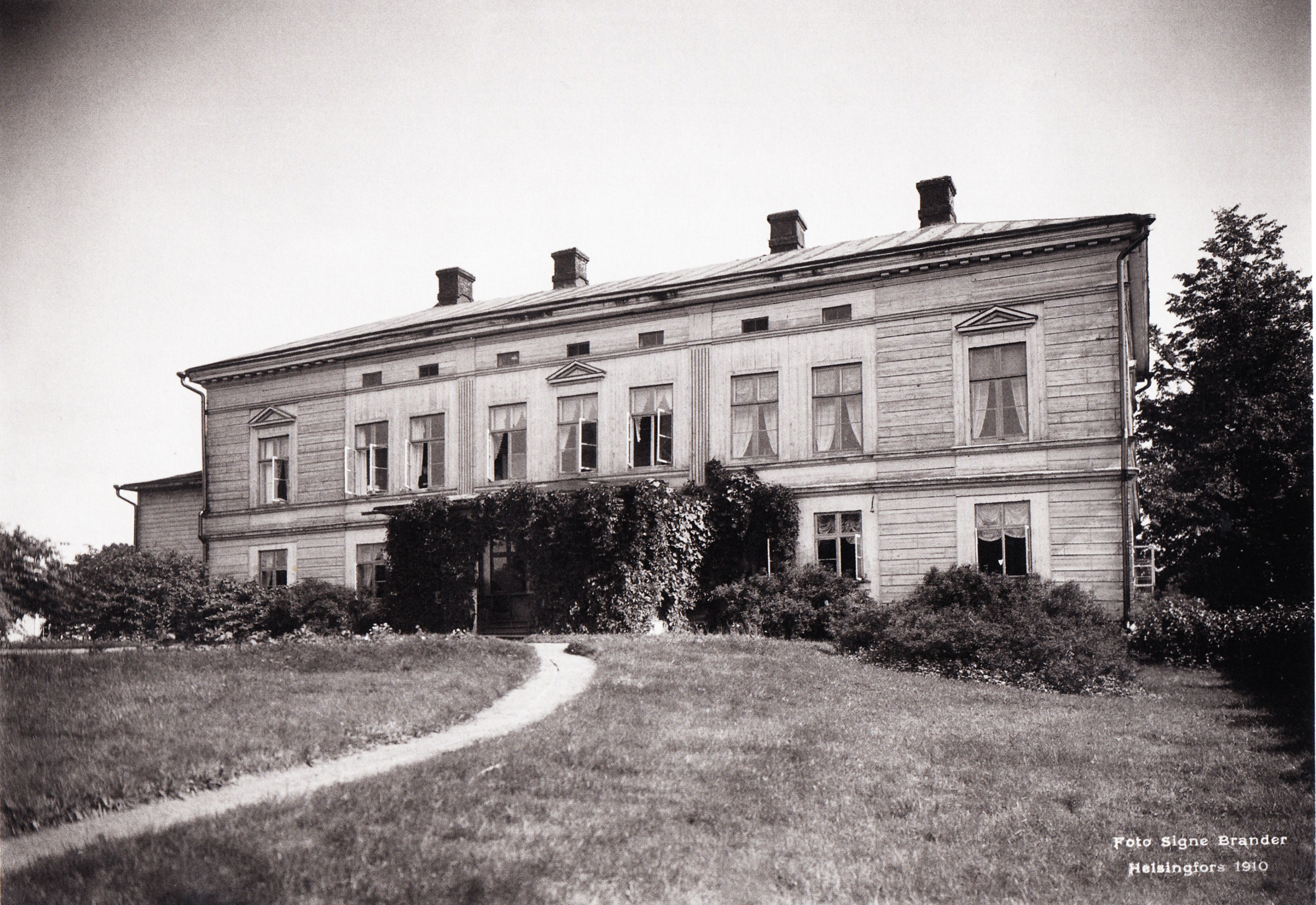 Kirkniemen kartano